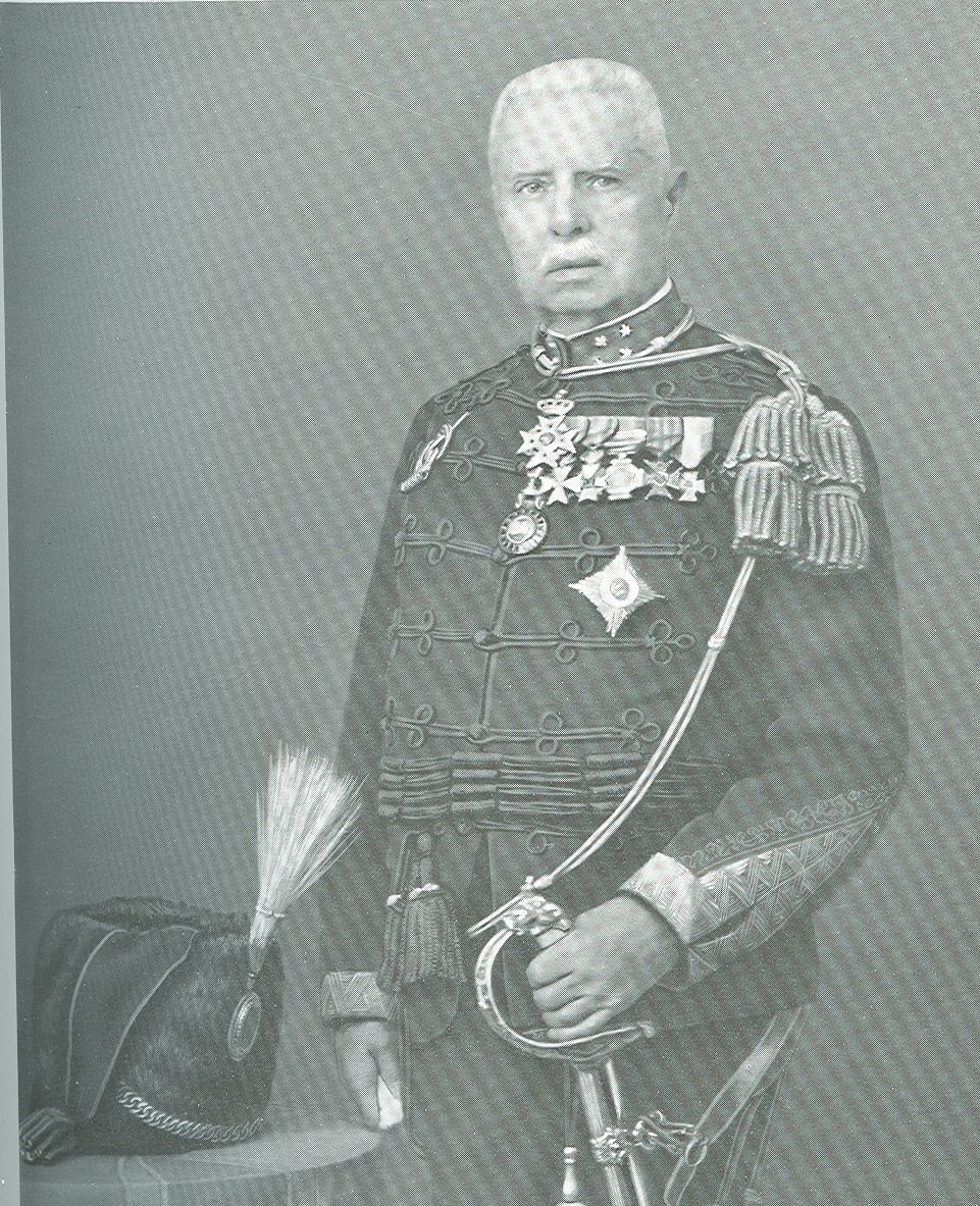 Willem Boetje op een foto uit 1926